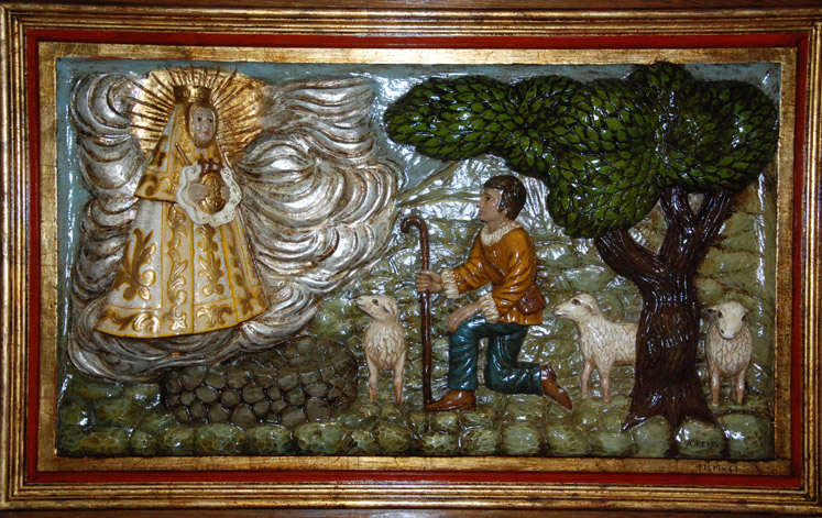 Bajorrelieve de la aparición de la Virgen de las Cruces de Don Benito.